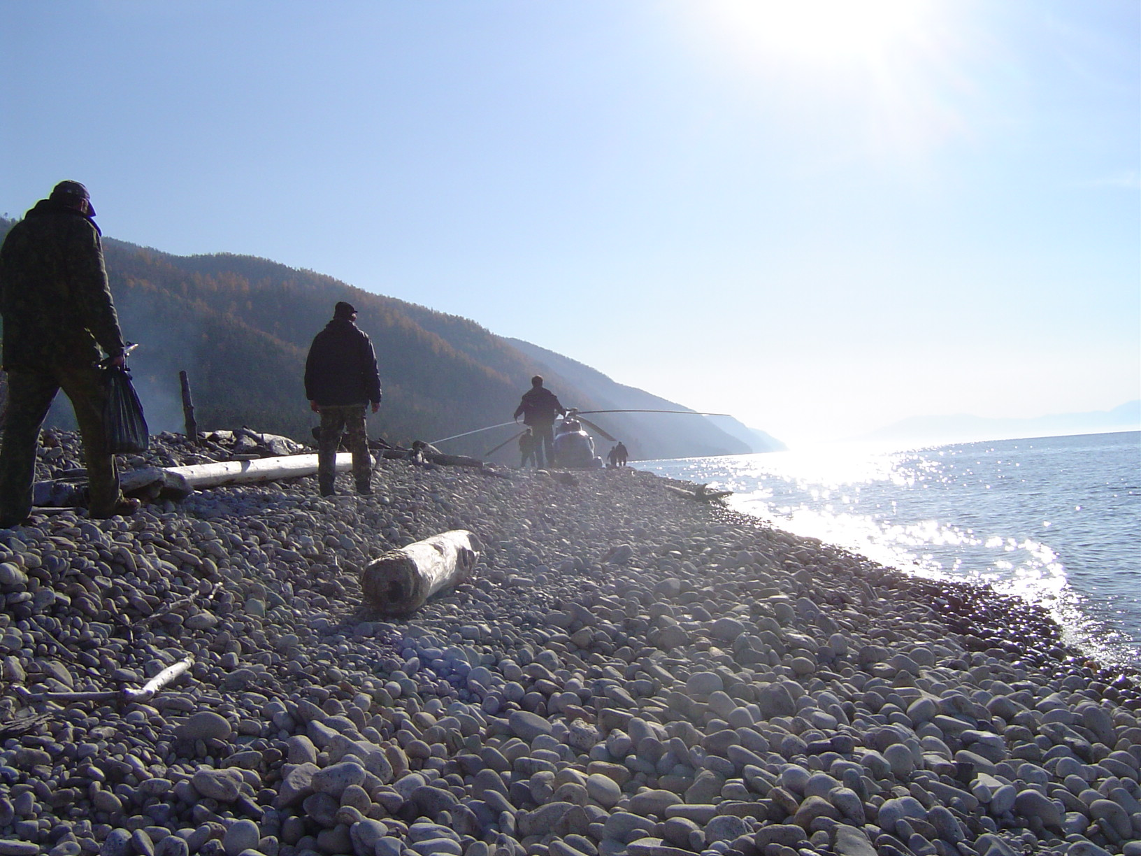 Туристы на Байкале